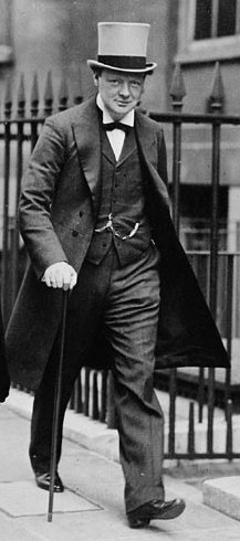 Winston Churchill verlässt das Gebäude der Admiralität (1912)